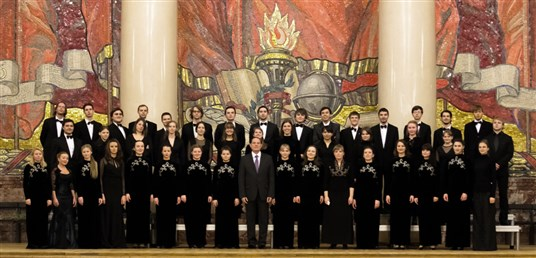 This work is free and may be used by anyone for any purpose. If you wish to use this content, you do not need to request permission as long as you follow any licensing requirements mentioned on this page.